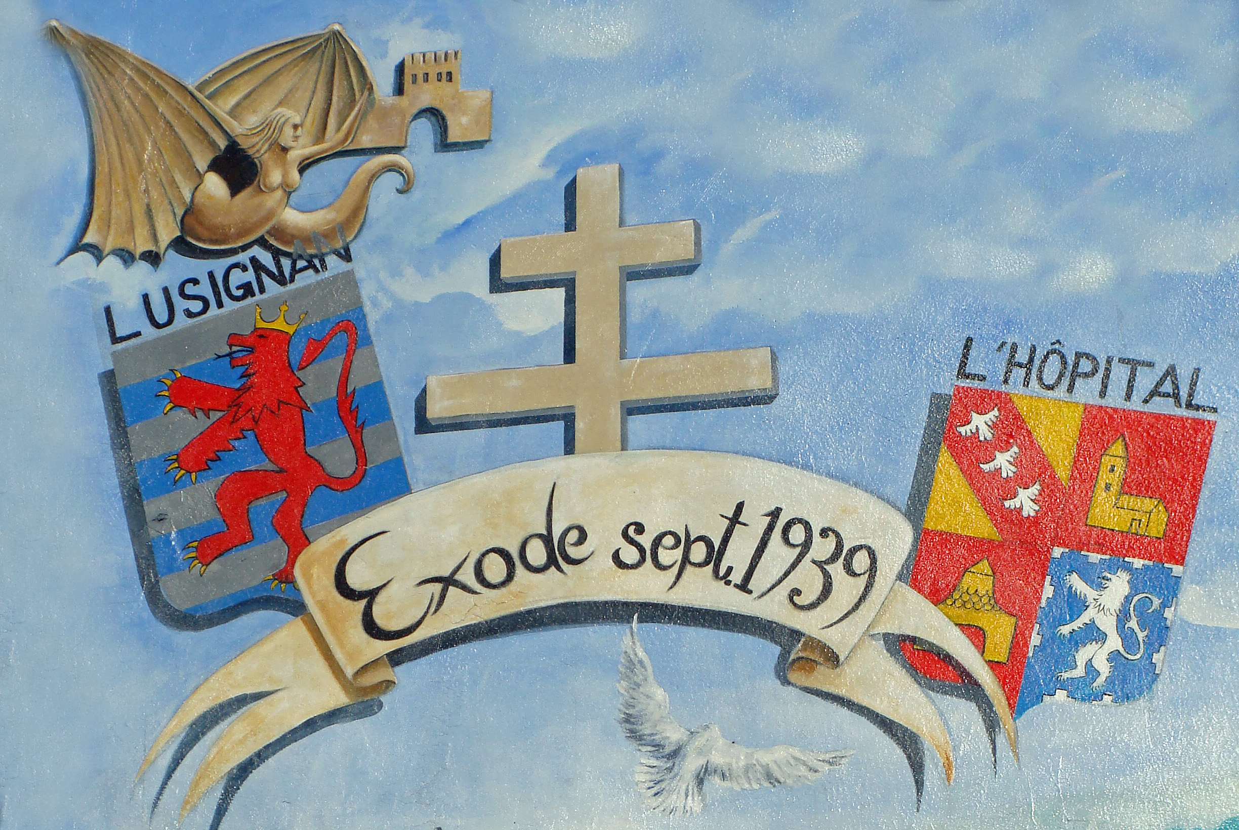 Détail de la fresque d'Eric Haven relatant l'exode des habitants de L'Hôpital (Moselle) durant la Seconde Guerre mondiale.